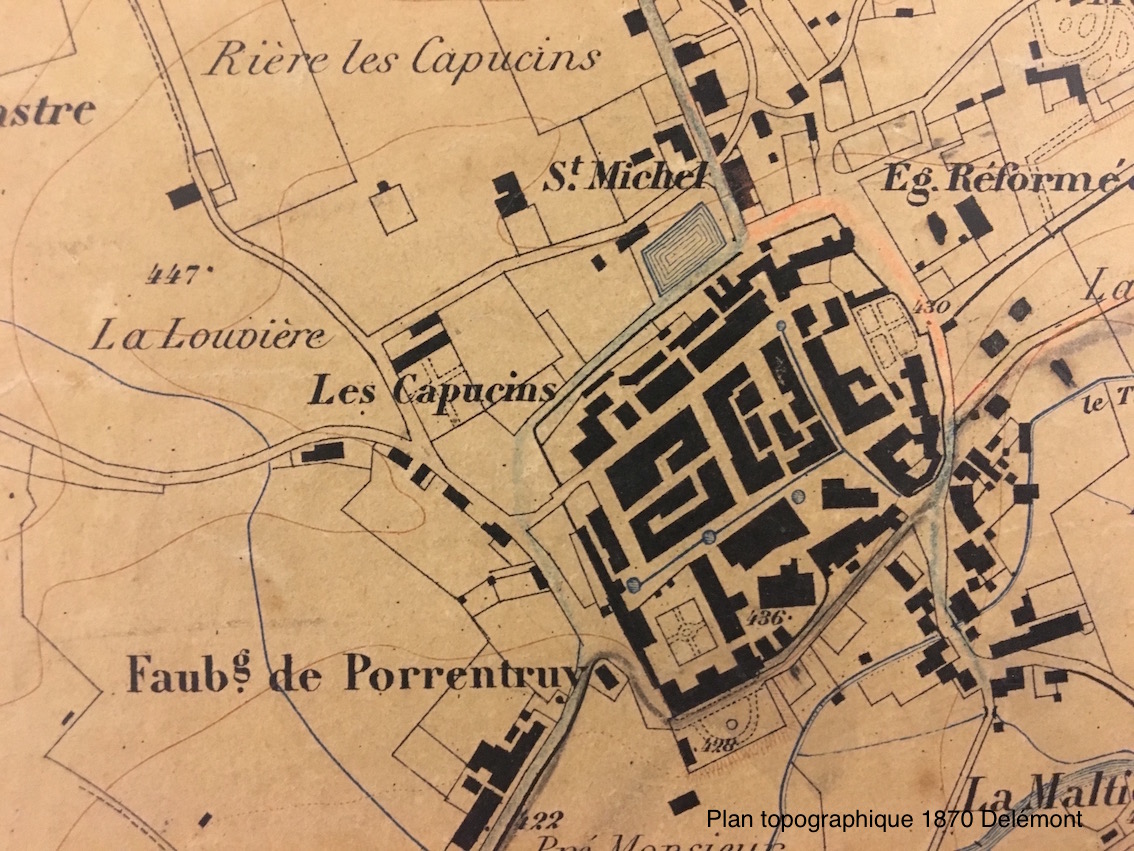 Photographie d'une archive communale, un ancien plan de cadastre de la ville de Delémont.